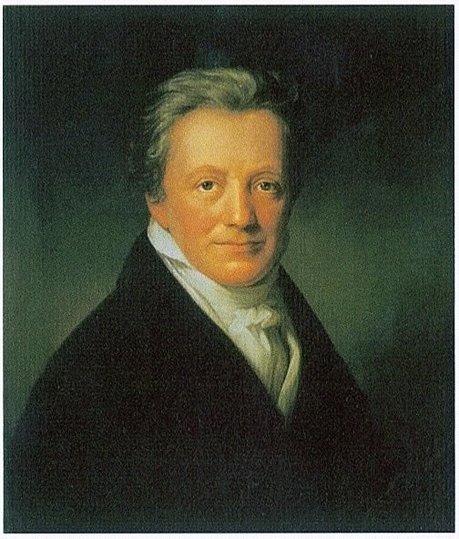 Salomon Heine (Salomon Heine), Heinrich Heine's uncle